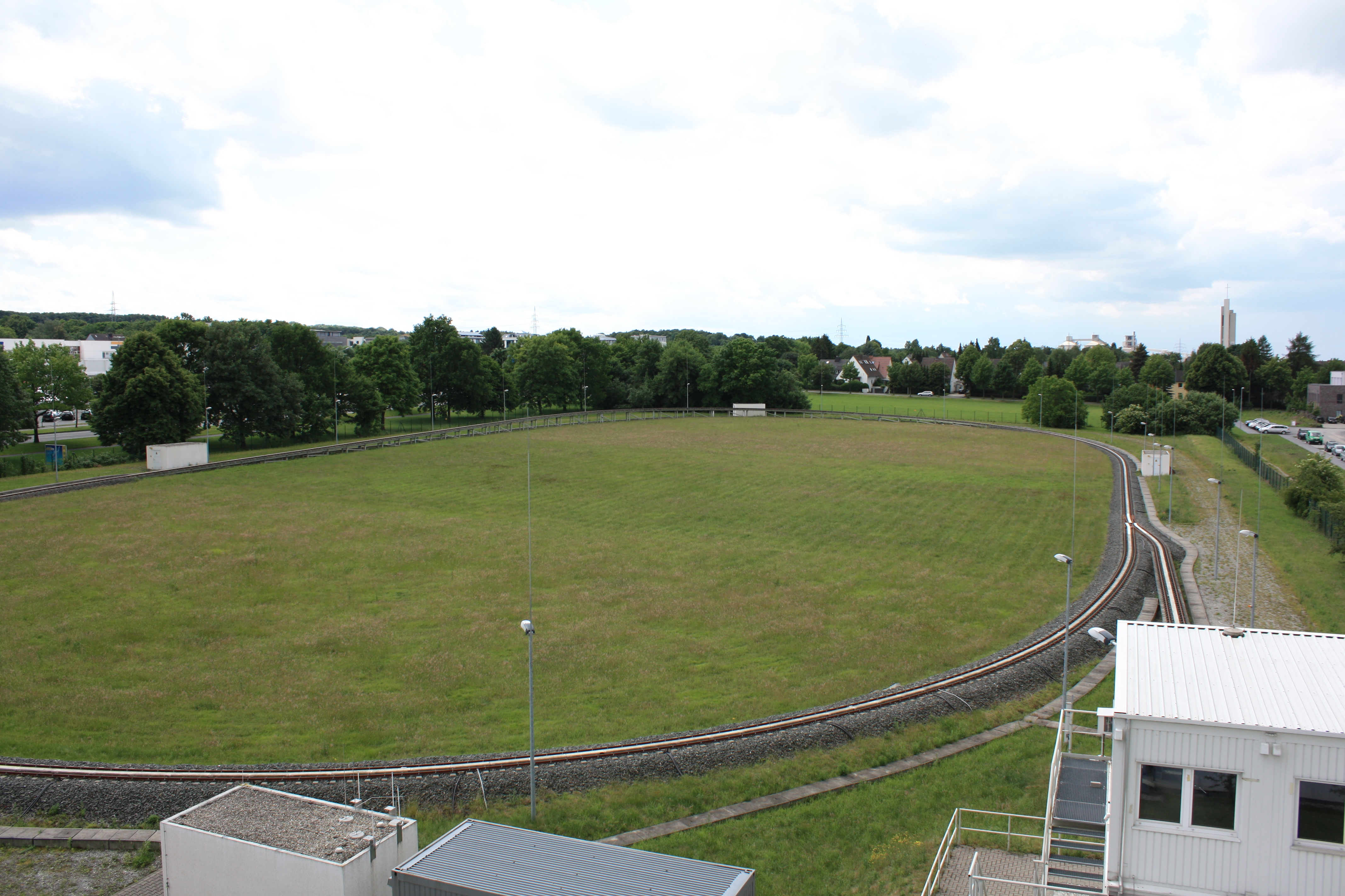 Testgelände der neuen Bahntechnik Paderborn